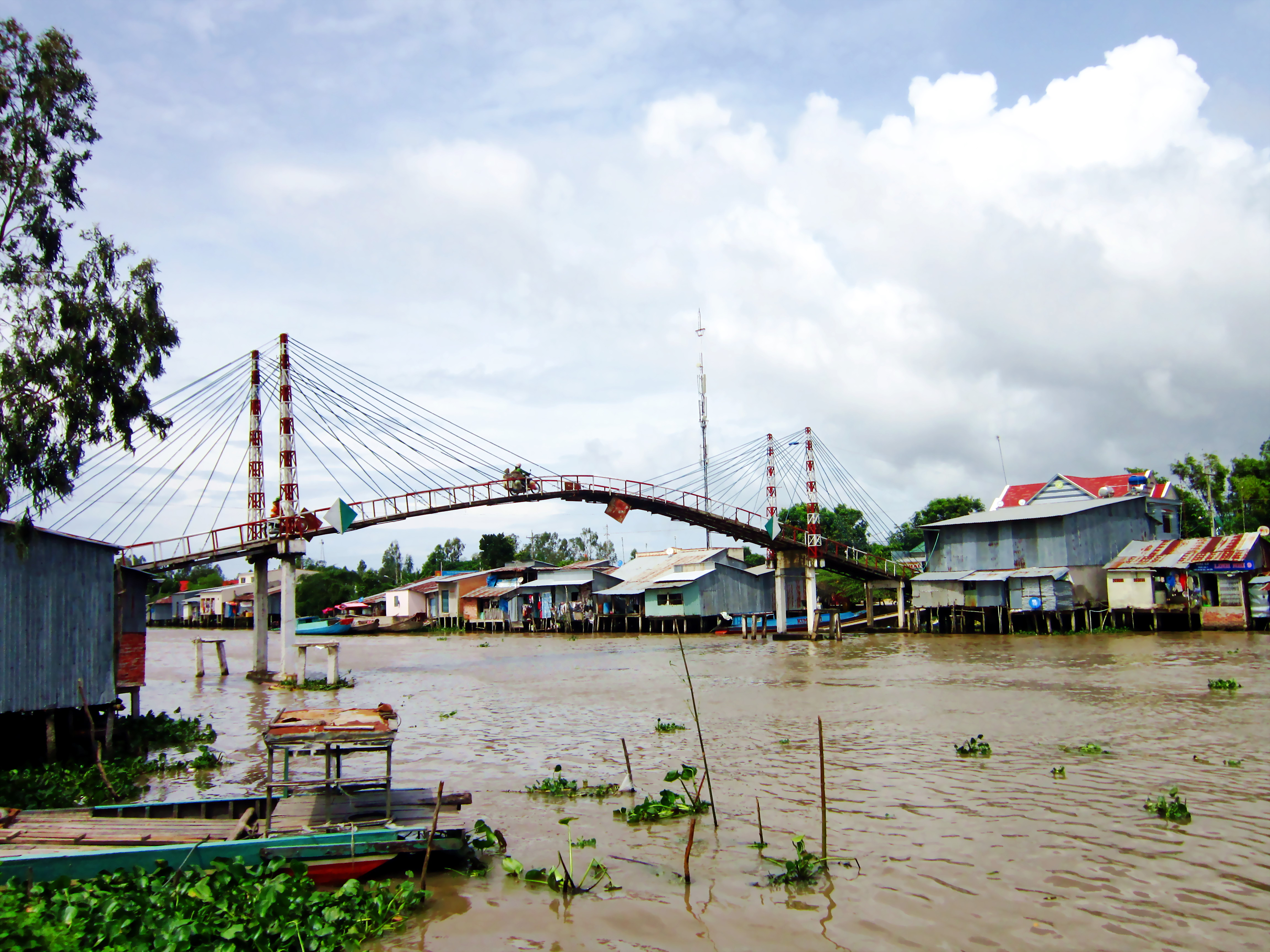 Cầu sắt bắc qua kênh Thoại Hà, dẫn đến khu hành chính xã và chợ Tân Hội, thuộc huyện Tân Hiệp, tỉnh Kiên Giang, Việt Nam.